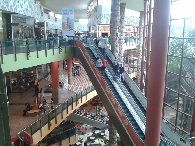 O Manauara Shopping fica localizado no bairro Adrianópolis, em Manaus.